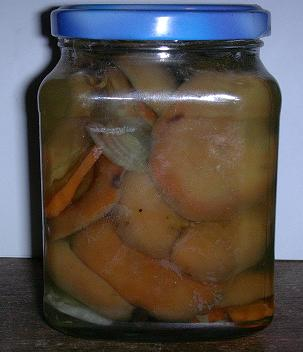 Marynowane grzyby (rydze) według przepisu własnego.